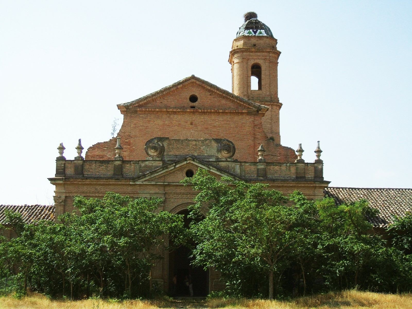 Cartuja de Nuestra Señora de las Fuentes (Cartuja de Monegros), en el término municipal de Sariñena, Huesca, Aragón, España.